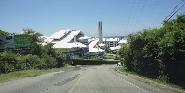 Av. Epitácio Bittencourt